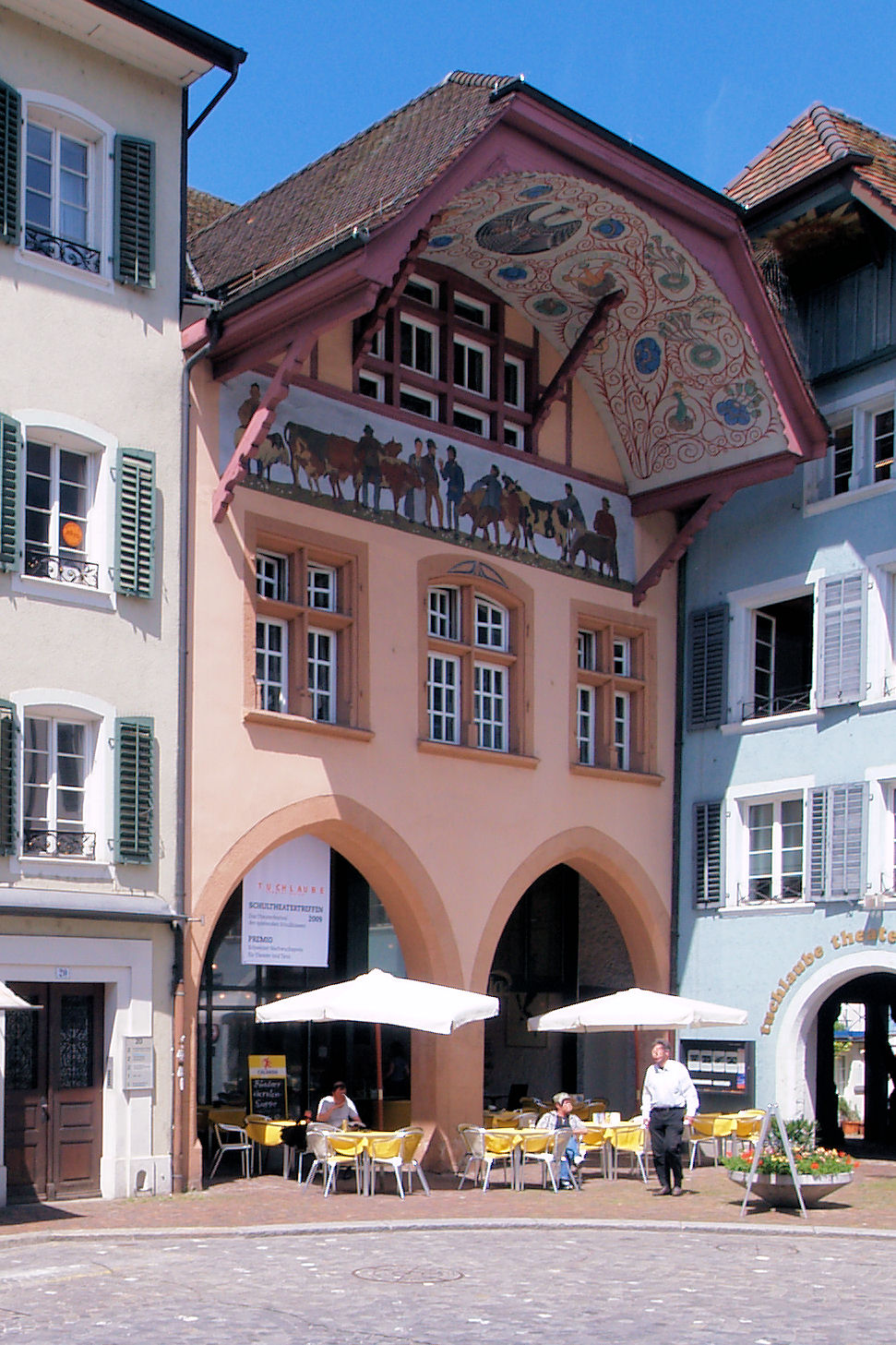 Der alte Schaal in der Stadt Aarau (Metzgergasse 18)